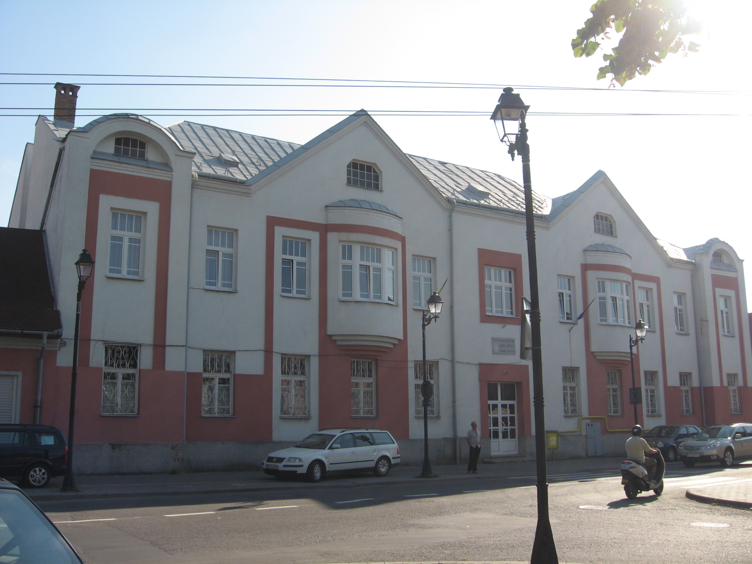 Acesata este o imagine cu un monument istoric din Romania clasificat cu numarul MM-II-m-B-04469.